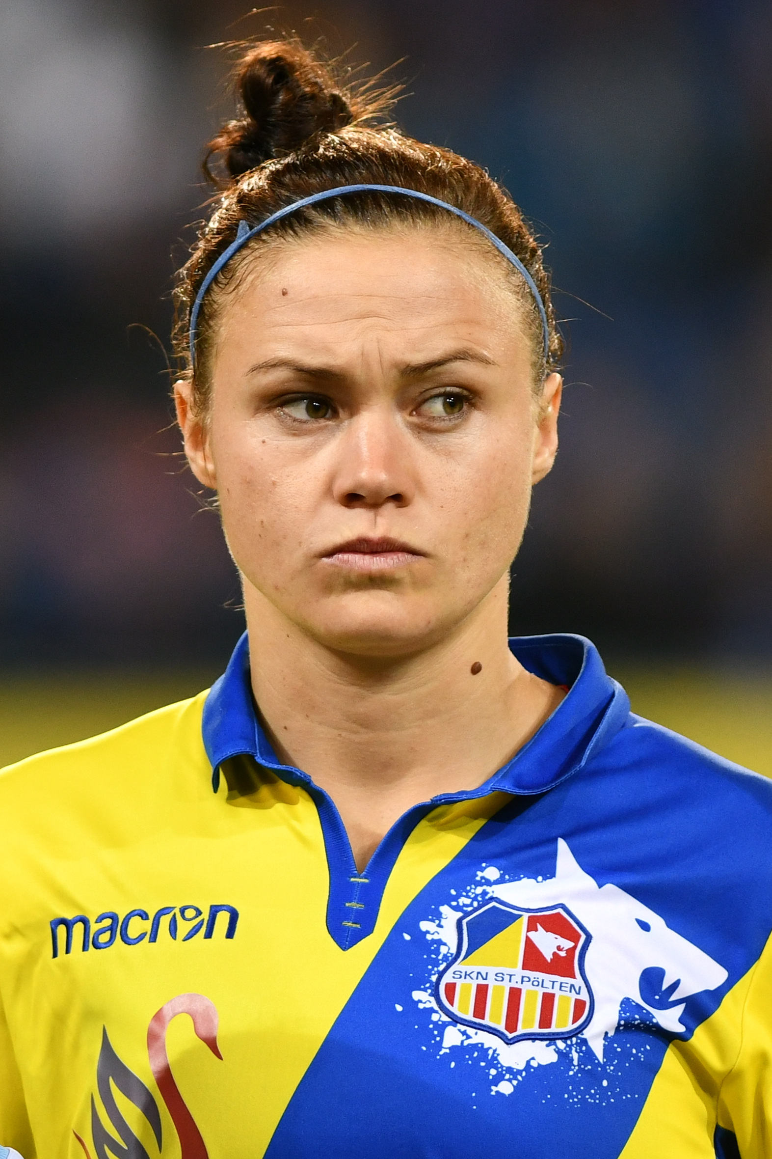 UEFA Women's Champions League 2017/18, Runde der letzten 32, SKN St. Pölten gegen Manchester City W.F.C. am 4.10.2017, Bild zeigt: Stefanie Enzinger